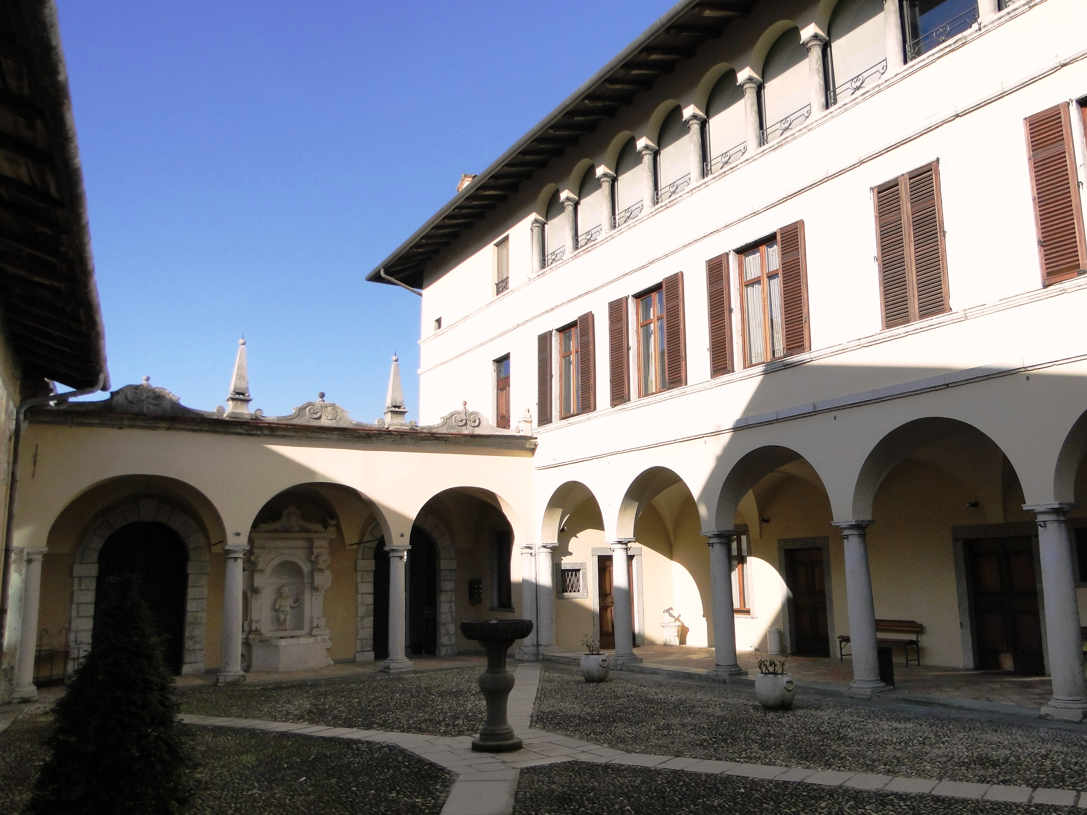 Palazzo Galizzi, casa parrocchiale. Leffe (BG). Italy